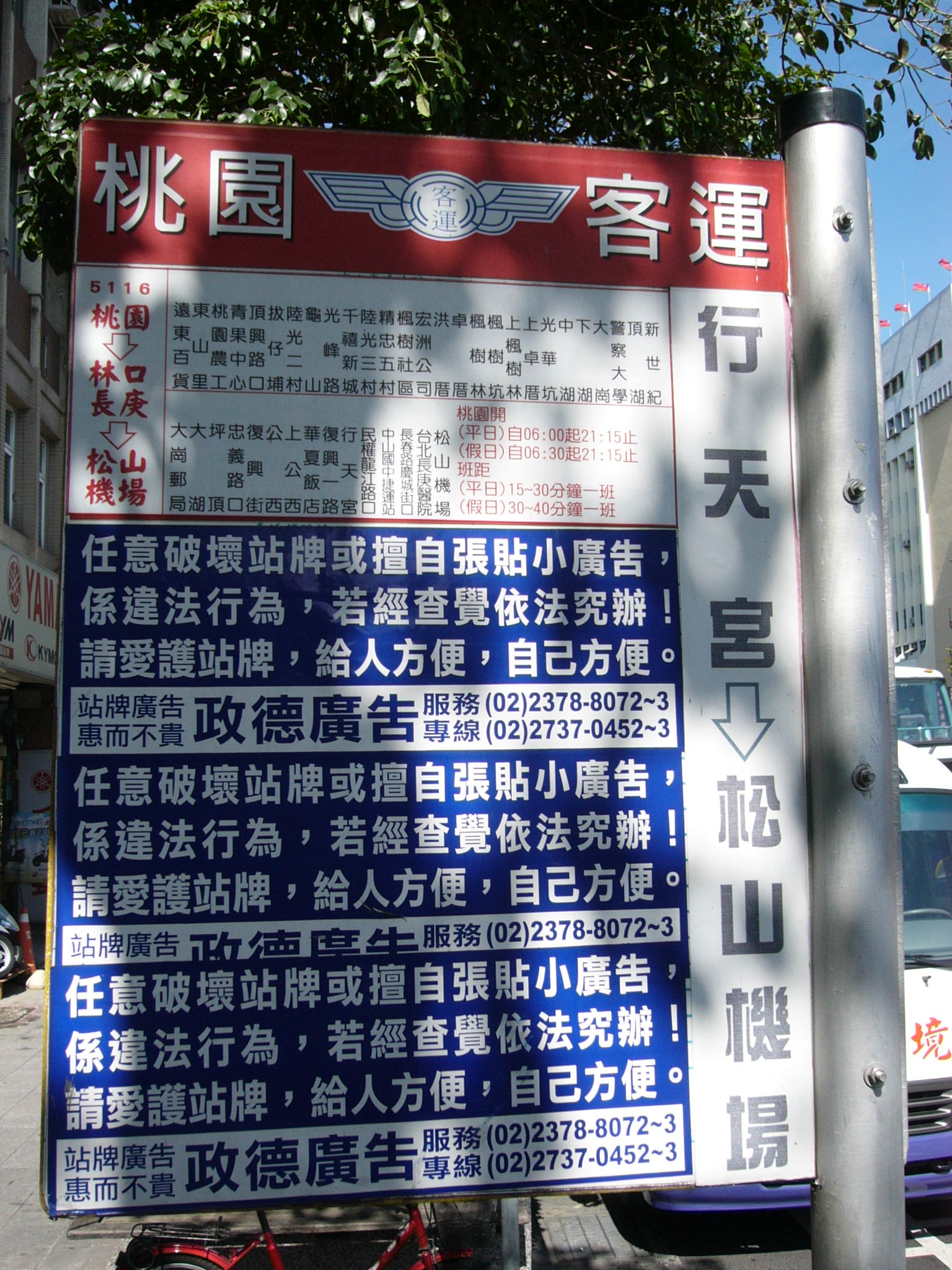 桃園客運5116線「行天宮」站牌。